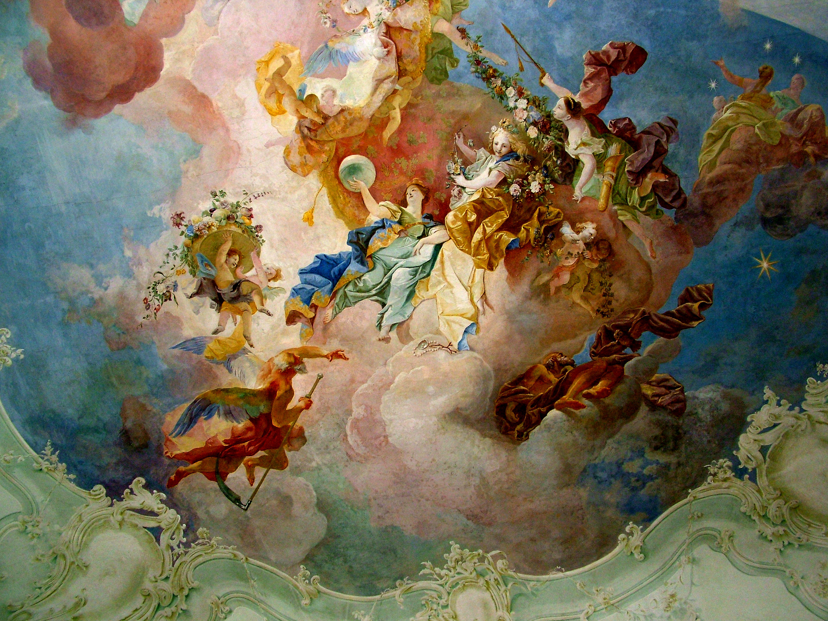 Halbturn (Féltorony): a Maulbertsch-freskó a kastély nagytermében (Ausztria)